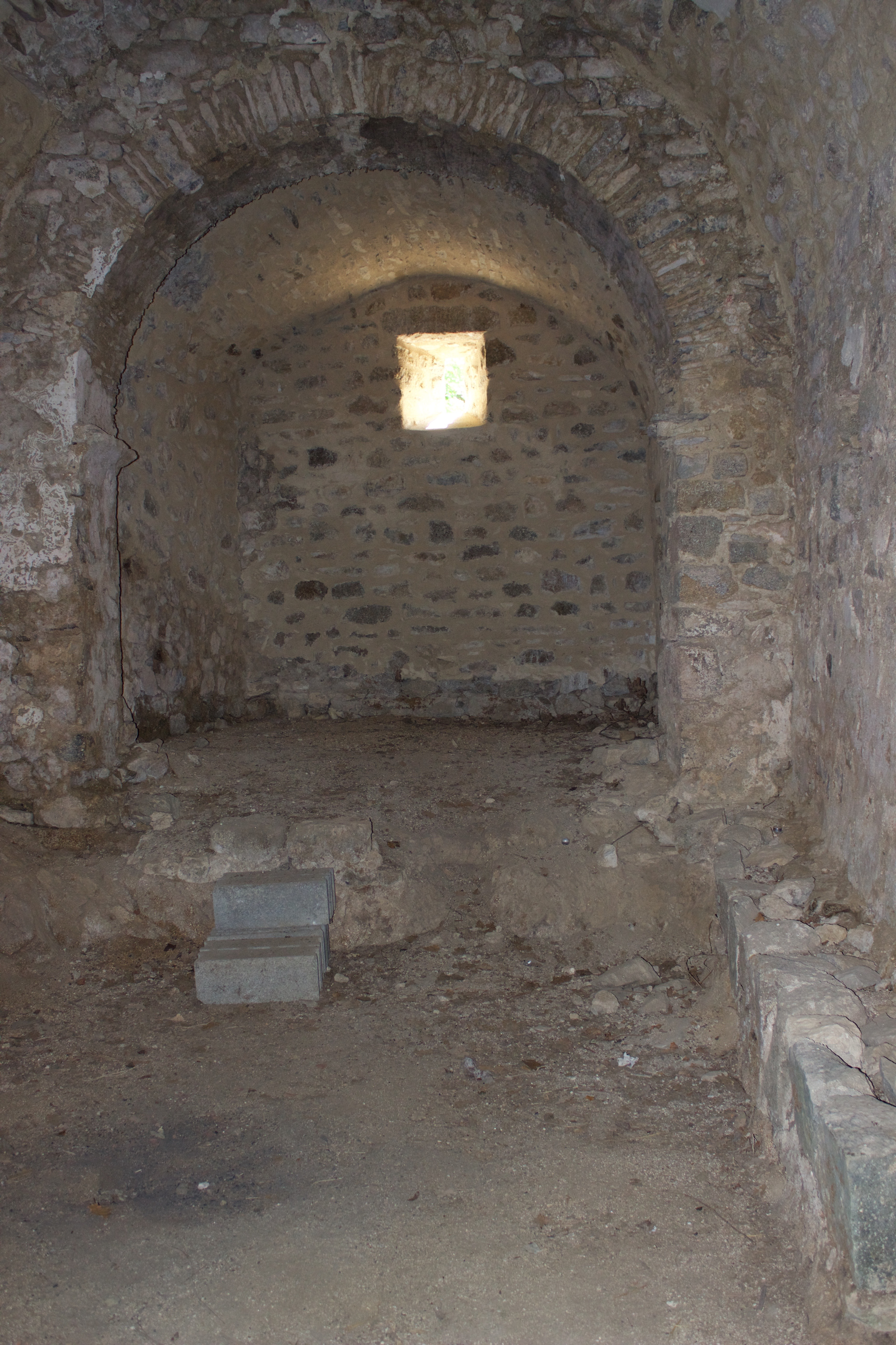 Église Sainte-Cécile de Cos